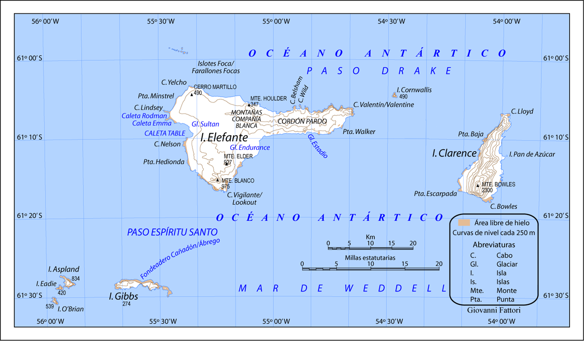 Mapa de las Islas Piloto Pardo. Proyeccion conica A. Paralelo estándar -61.25